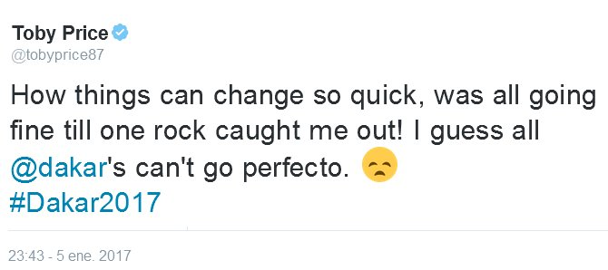 Twiter de Toby Price durante el Dakar 2017. - How things can change - 5-1-2017